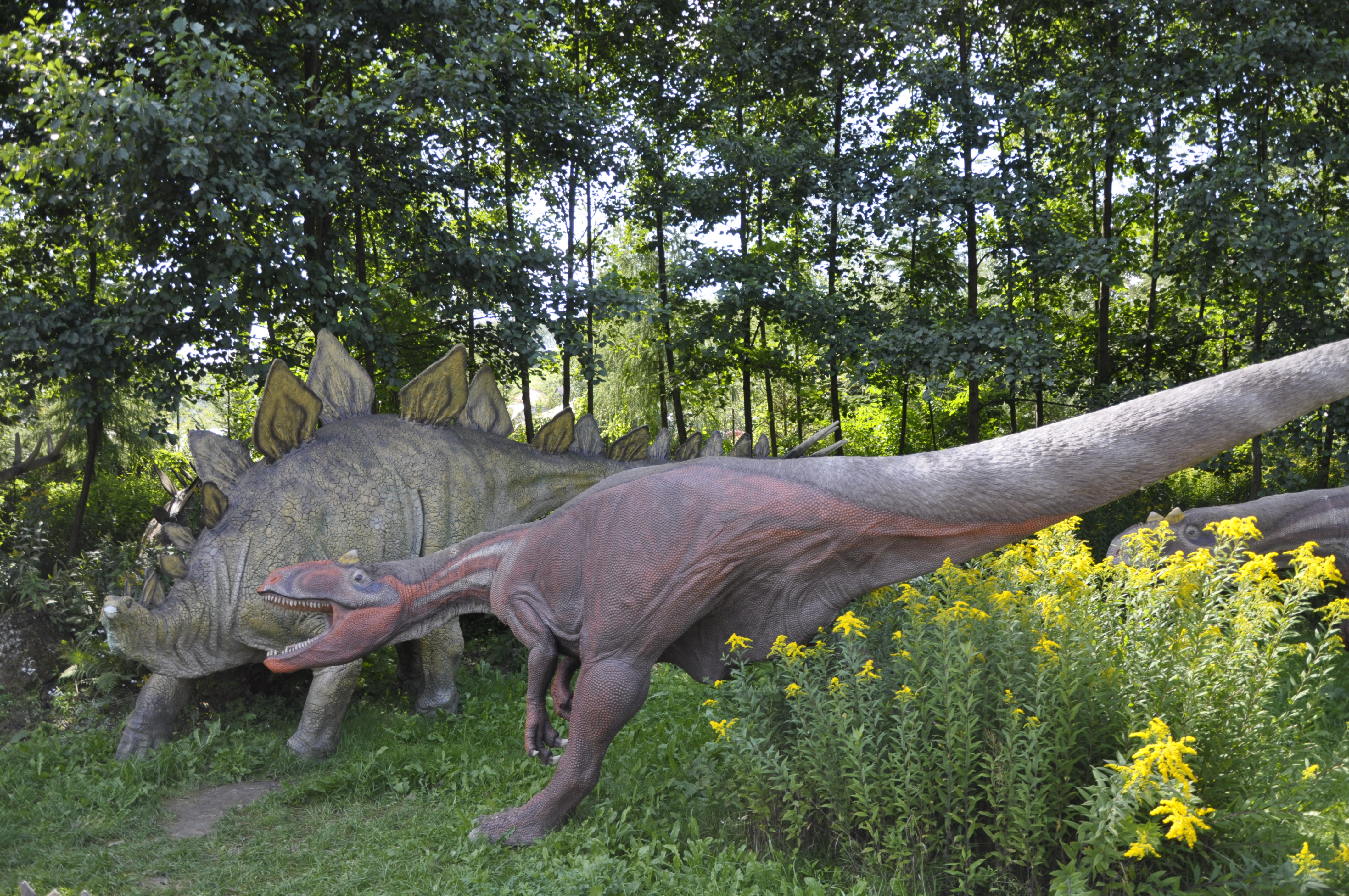 JuraPark Bałtów - Park Dinozaurów